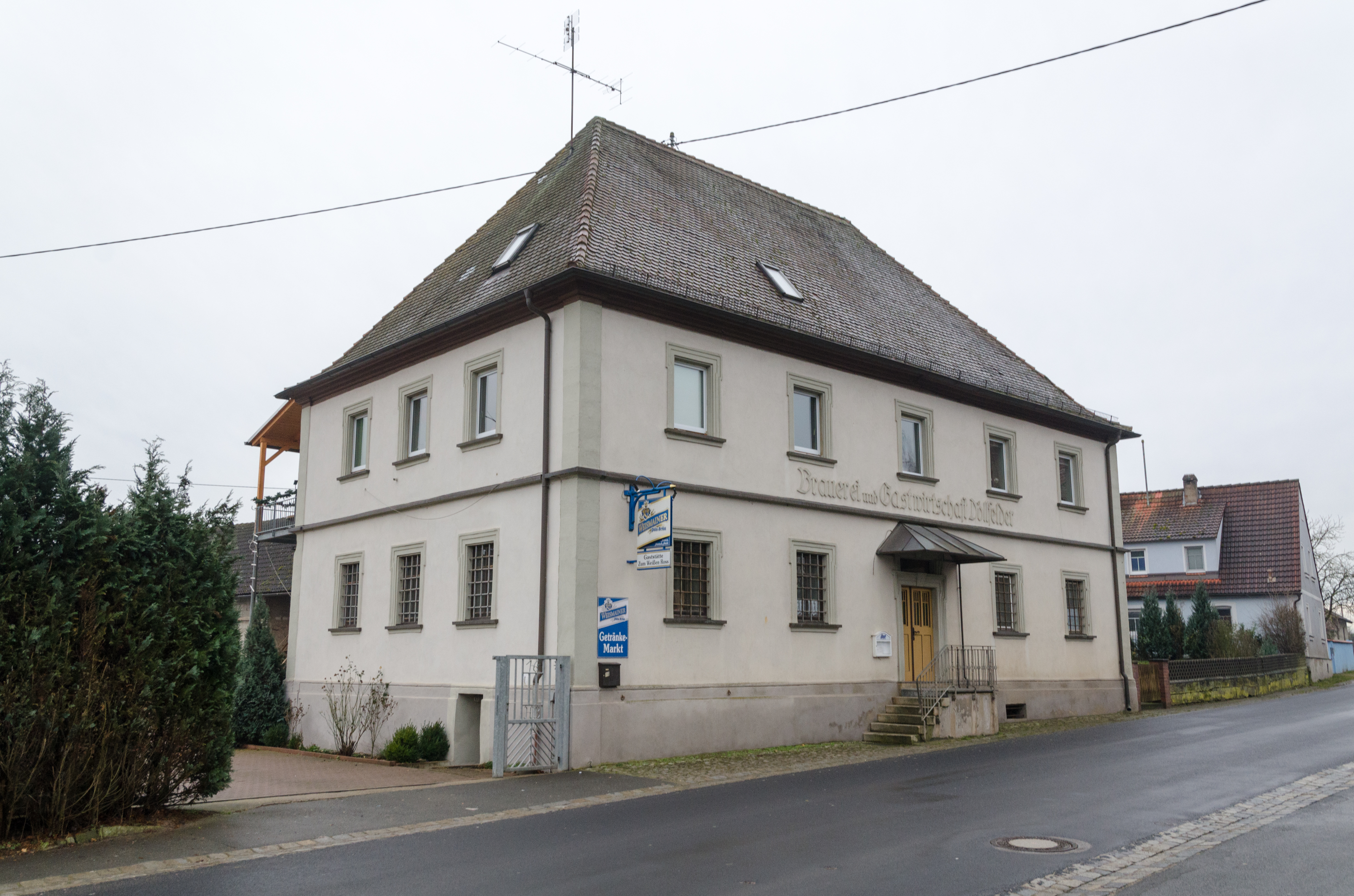 Geiselwind, Wasserberndorf, Würzburger Straße 16